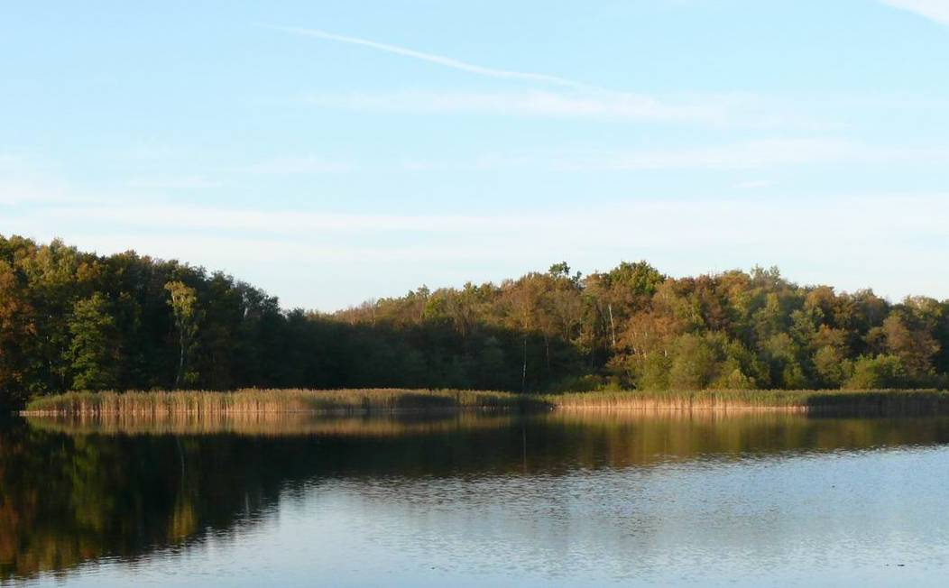 Blick auf das Nordufer des Kirchensees, Teil des Naturschutzgebiets Strangen. Mecklenburg-Vorpommern.